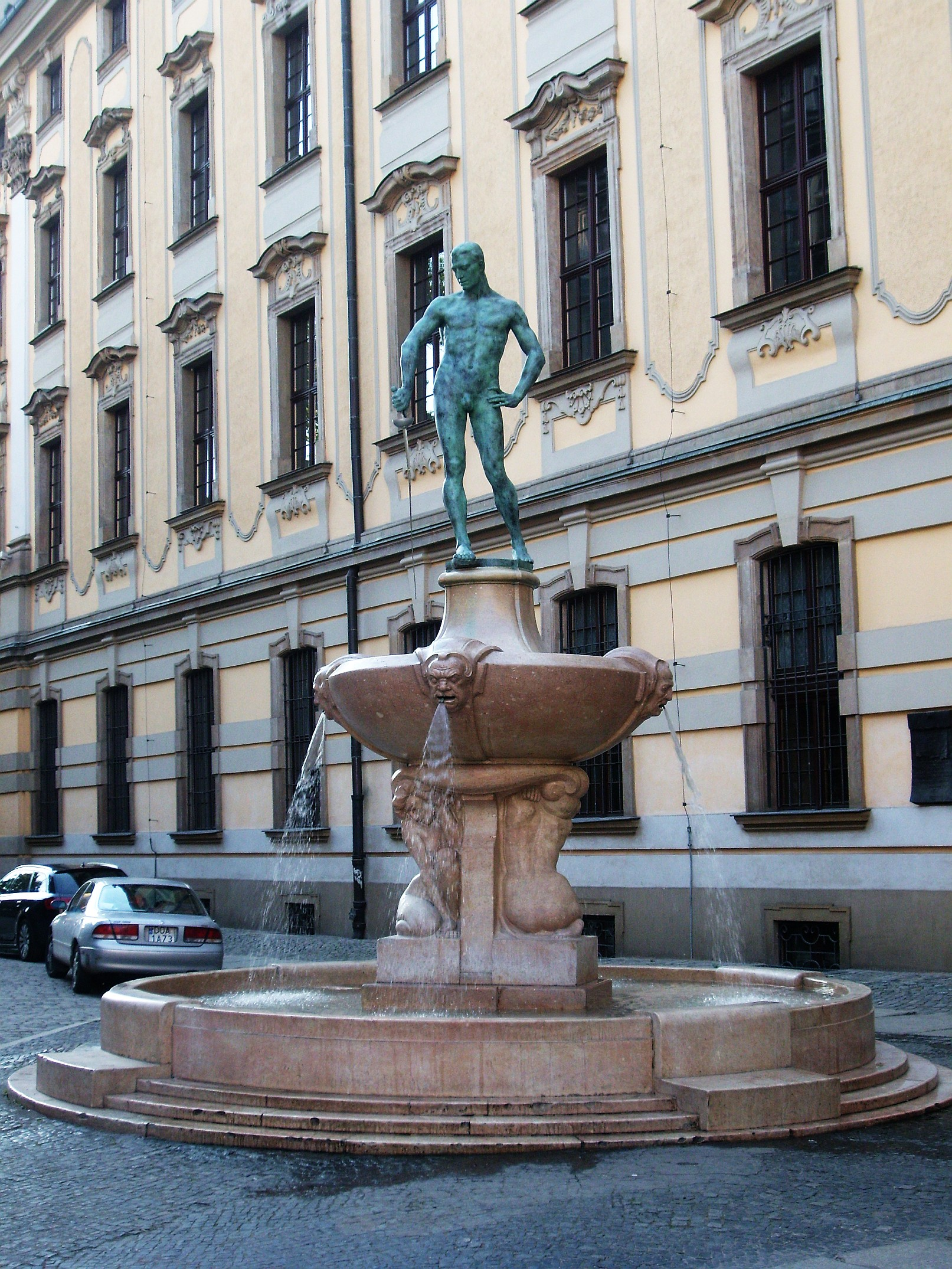 Wroclaw